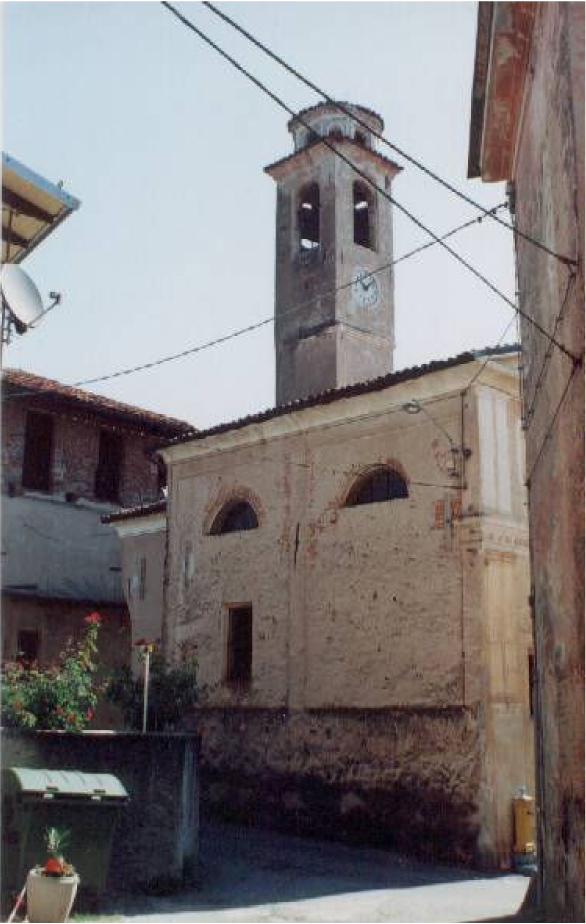 vista esterna prima del restauro